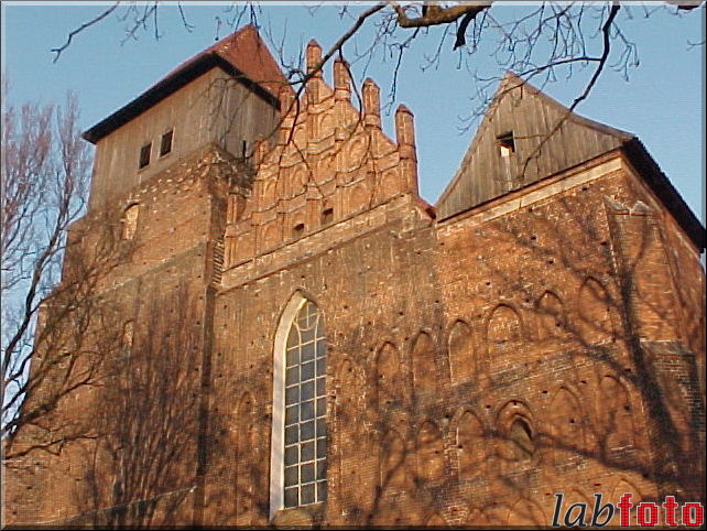 Kościół św. Mateusza w Nowym Stawie